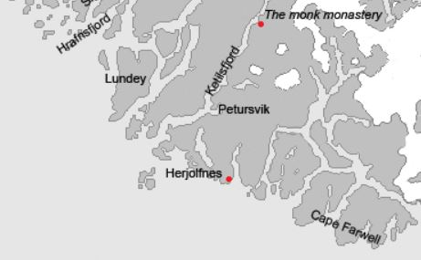 Position d'Herjolfsnes dans l'établissement de l'Est